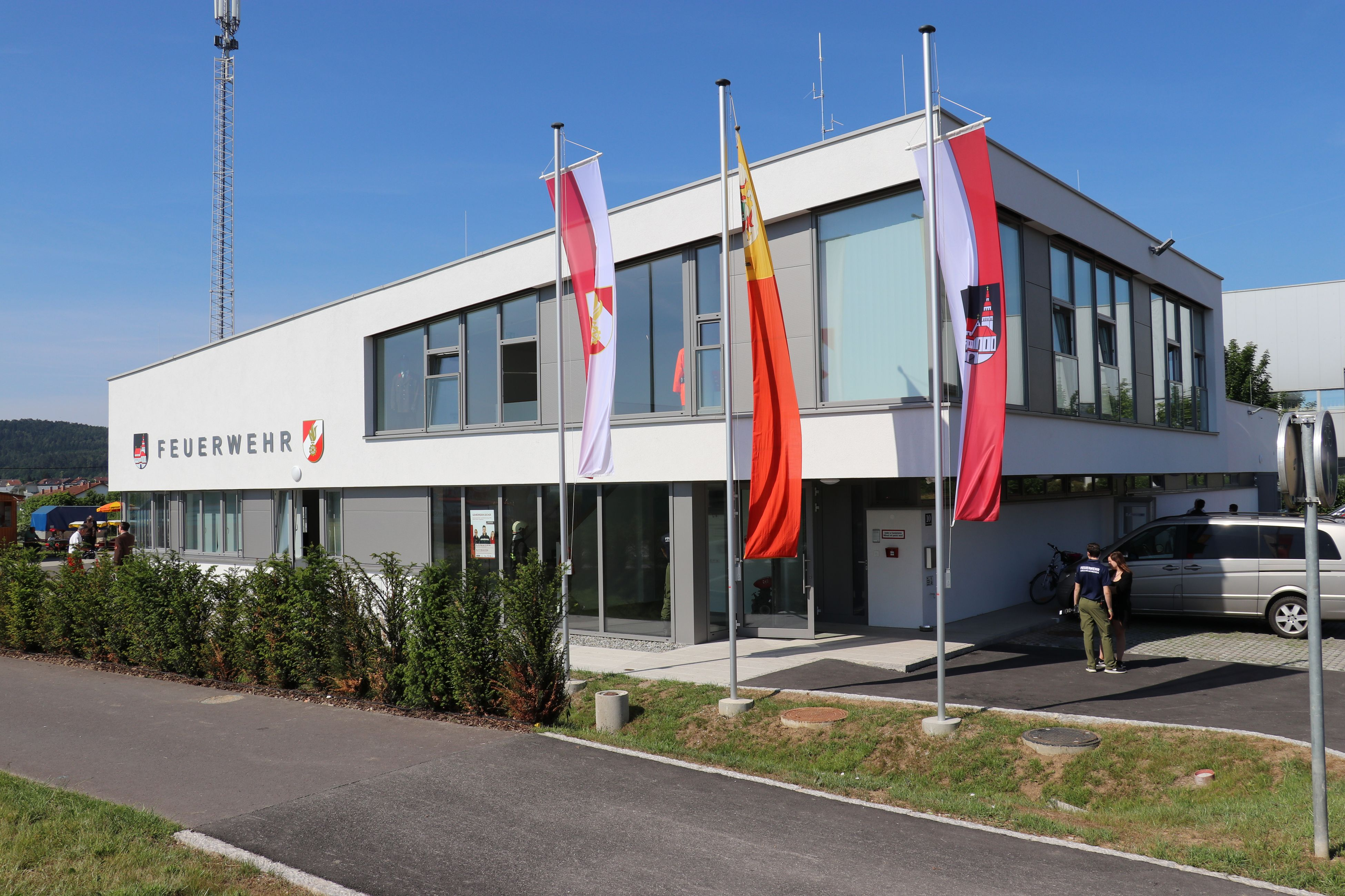 Feuerwehrhauseröffnung der FF Gallneukirchen am 26. und 27. Mai 2018